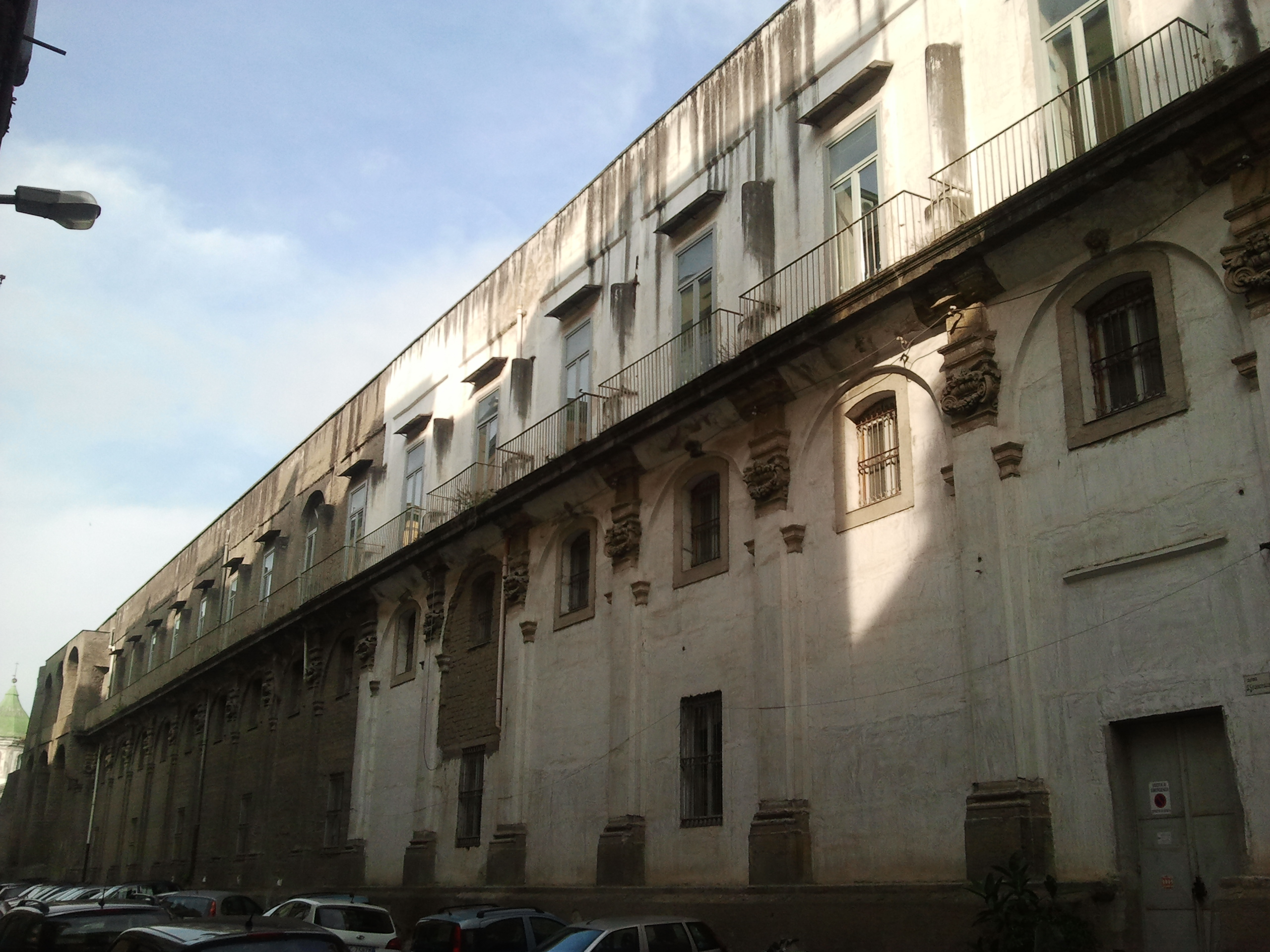 Convento di Santa Margherita a Fonseca ora edificio scolastico ripreso dal rione Ferrovieri.